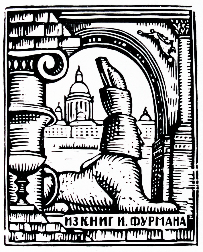 Экслібрыс Івана Фурмана. Цынкаграфскае клішэ.